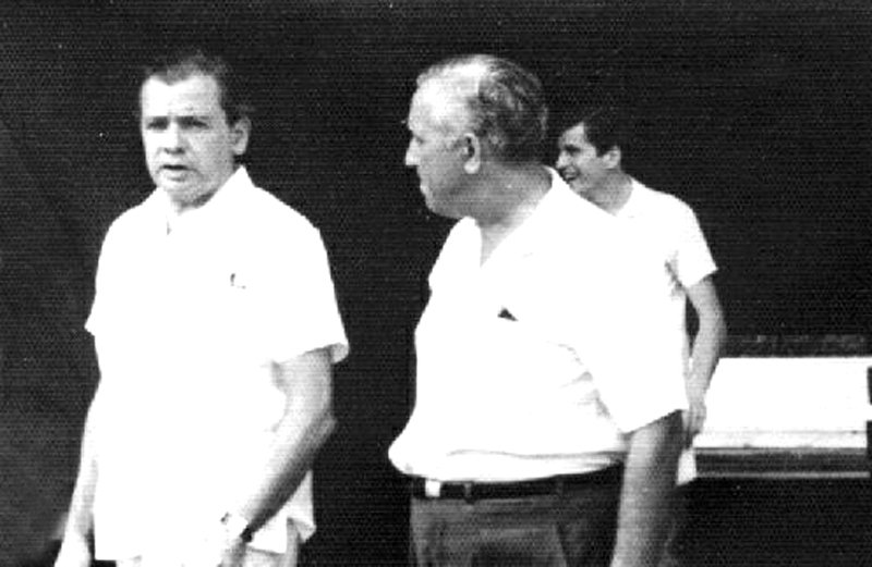 Roberto Costa de Abreu Sodré (governador do estado de São Paulo (de março de 1967 a março de 1971)